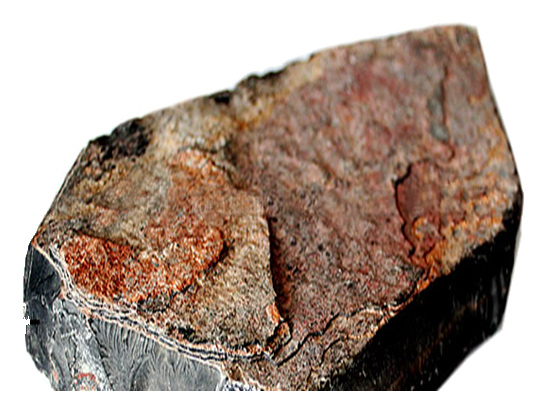 bloc de pieere stone needle